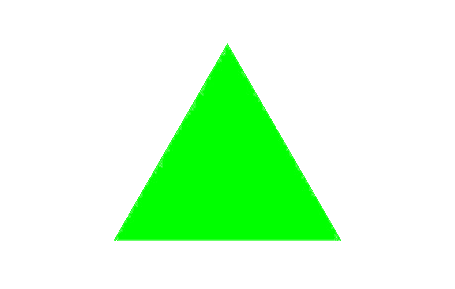 Desenhada por Wellington P F de lima. como bandeira extra-oficial que representava a província, baseando-se na coleção de Carlos Piquet, onde constam quinze bandeiras numeradas de número 36 até 50, com a rubrica “bandeiras das antigas províncias do Império”, no Museu Histórico Nacional.